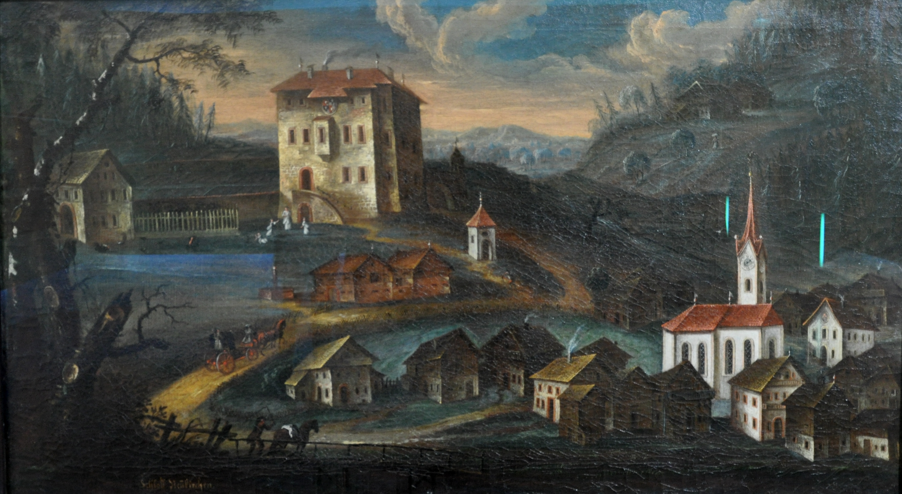 Burg Hochneukirchen in Neukirchen am Großvenedigertitle QS:P1476,de:"Burg Hochneukirchen in Neukirchen am Großvenediger" label QS:Lde,"Burg Hochneukirchen in Neukirchen am Großvenediger"